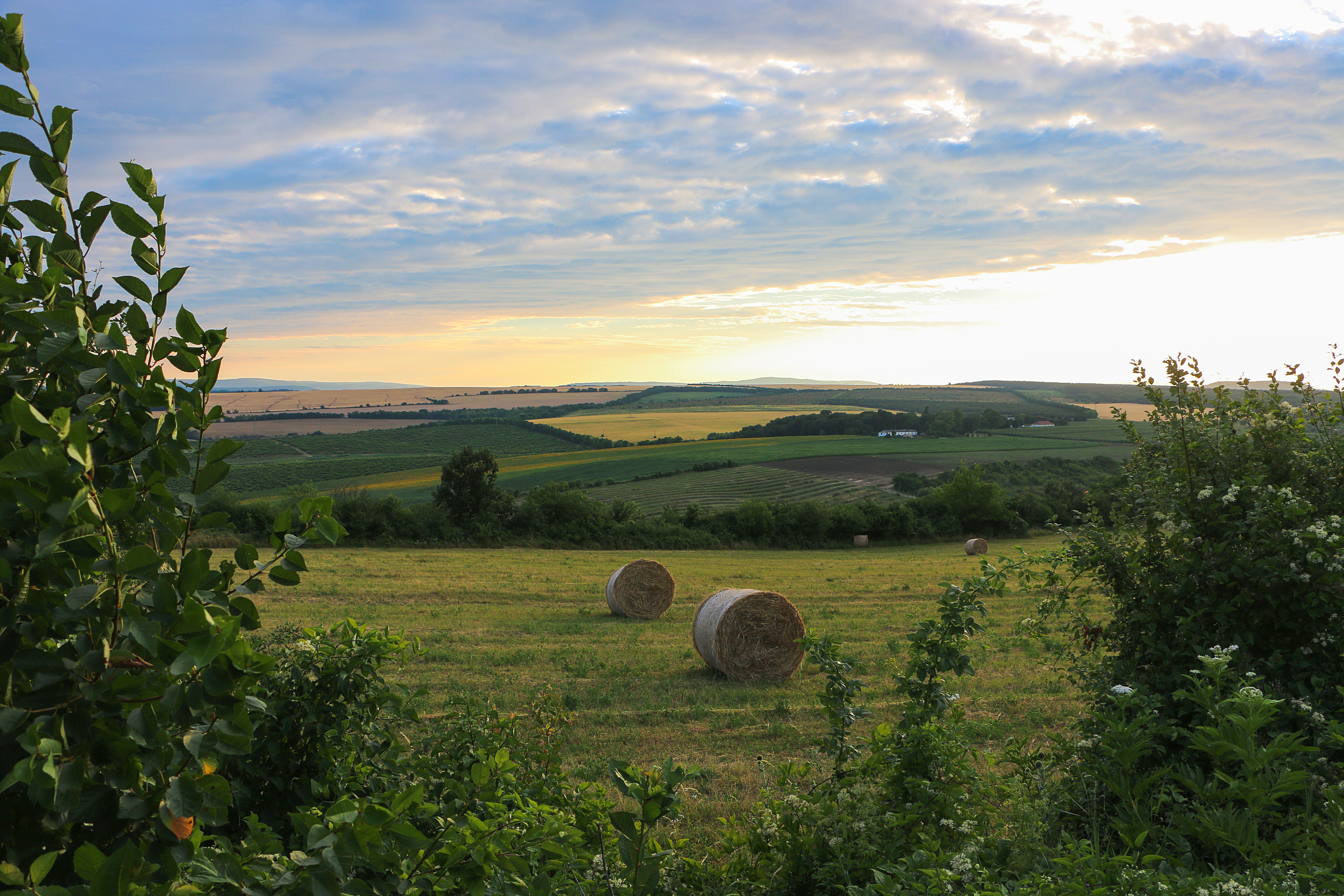 Felsőörs puszta a 1105 jelzésű útról, Mány és Zsámbék között, szemben a Zsámbéki Színházi és Művészeti Bázisra vezető aszfaltút bejáratával